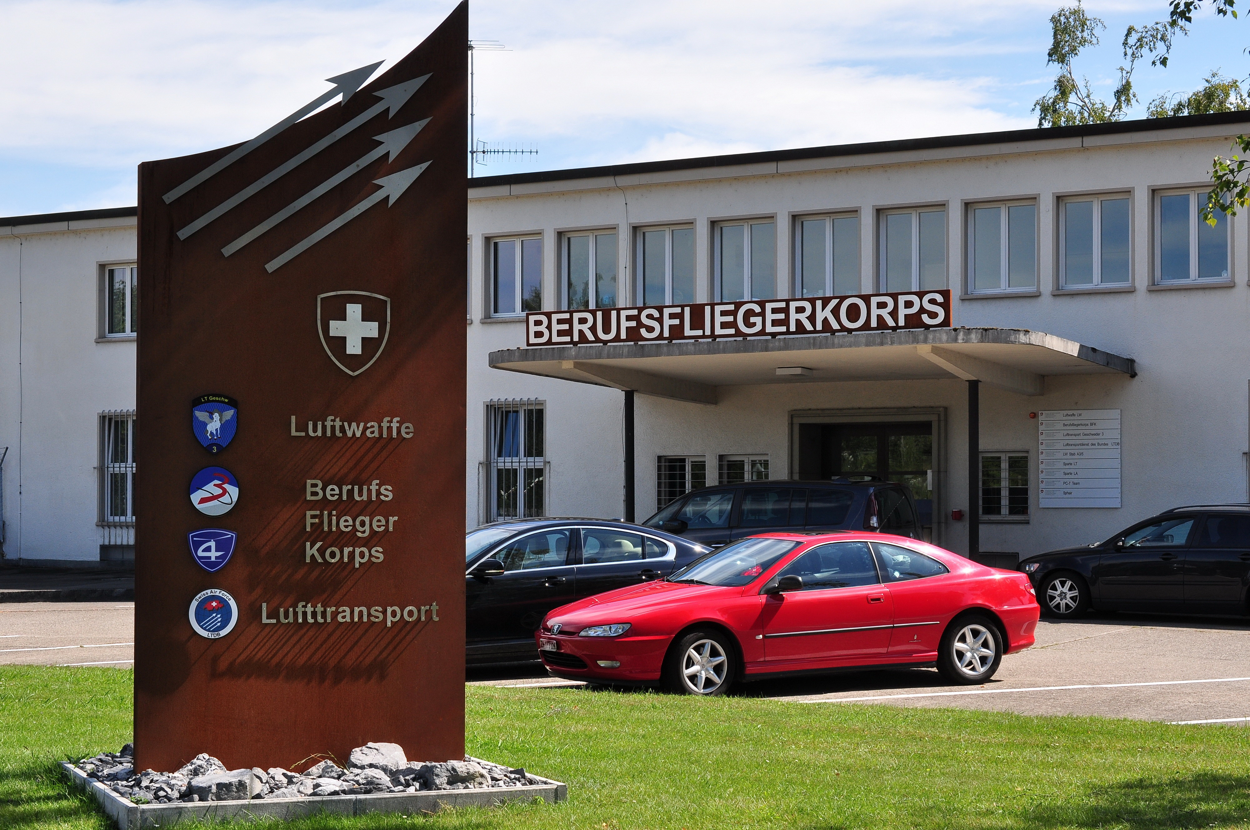 Flugplatz Dübendorf, ehemaliges Aufnahmegebäude Zivilflugplatz, Dübendorfstrasse in Wangen-Brüttisellen (Switzerland)